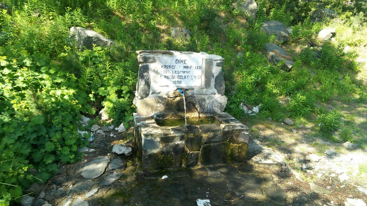 Kazdağları Tozlu mevkiinde bulunan Yassıçalı Köyü çeşmesi